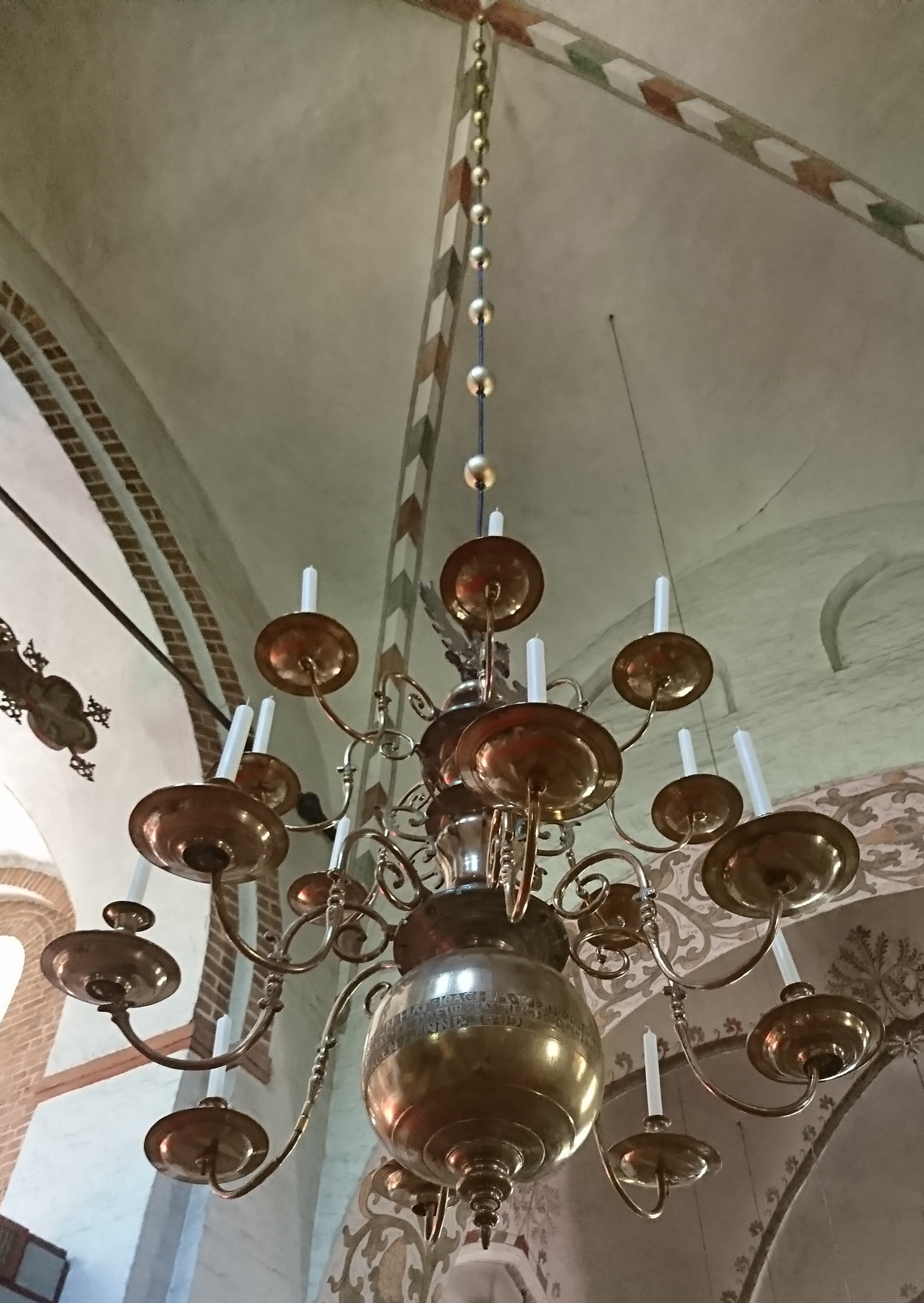 16-armiger Messingleuchter mit Inschrift und Datierung. Er wurde von Joachim Werner Höltich 1689 der St. Nicolai Kirche in Mölln gestiftet (Teil der Stiftung war auch ein namhafter Betrag, von dem jährlich die Kerzen zu erneuern sind). Er hängt über den Mittelgang der Kirche.